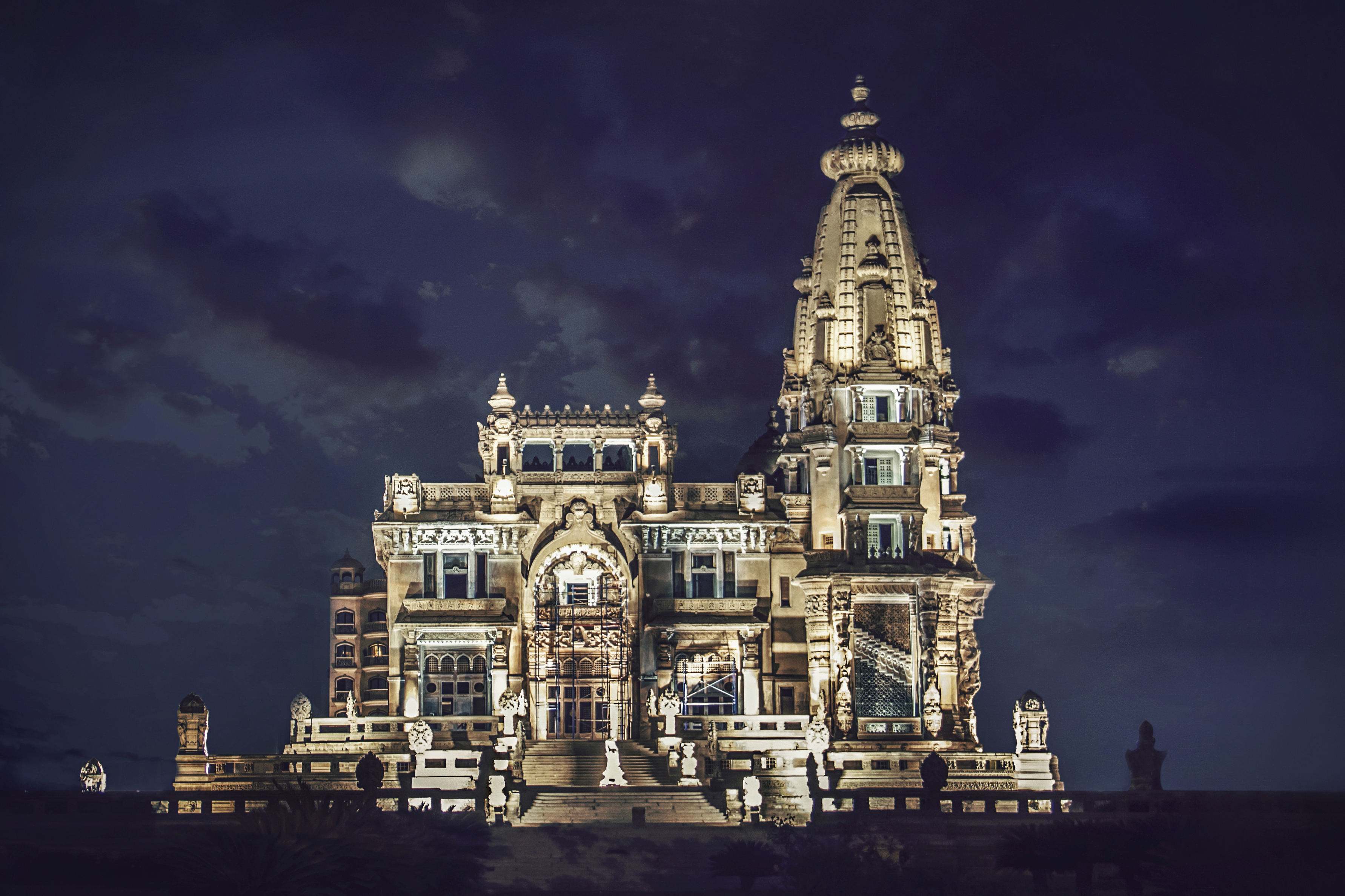 قصر البارون بمنطقه شيراتون